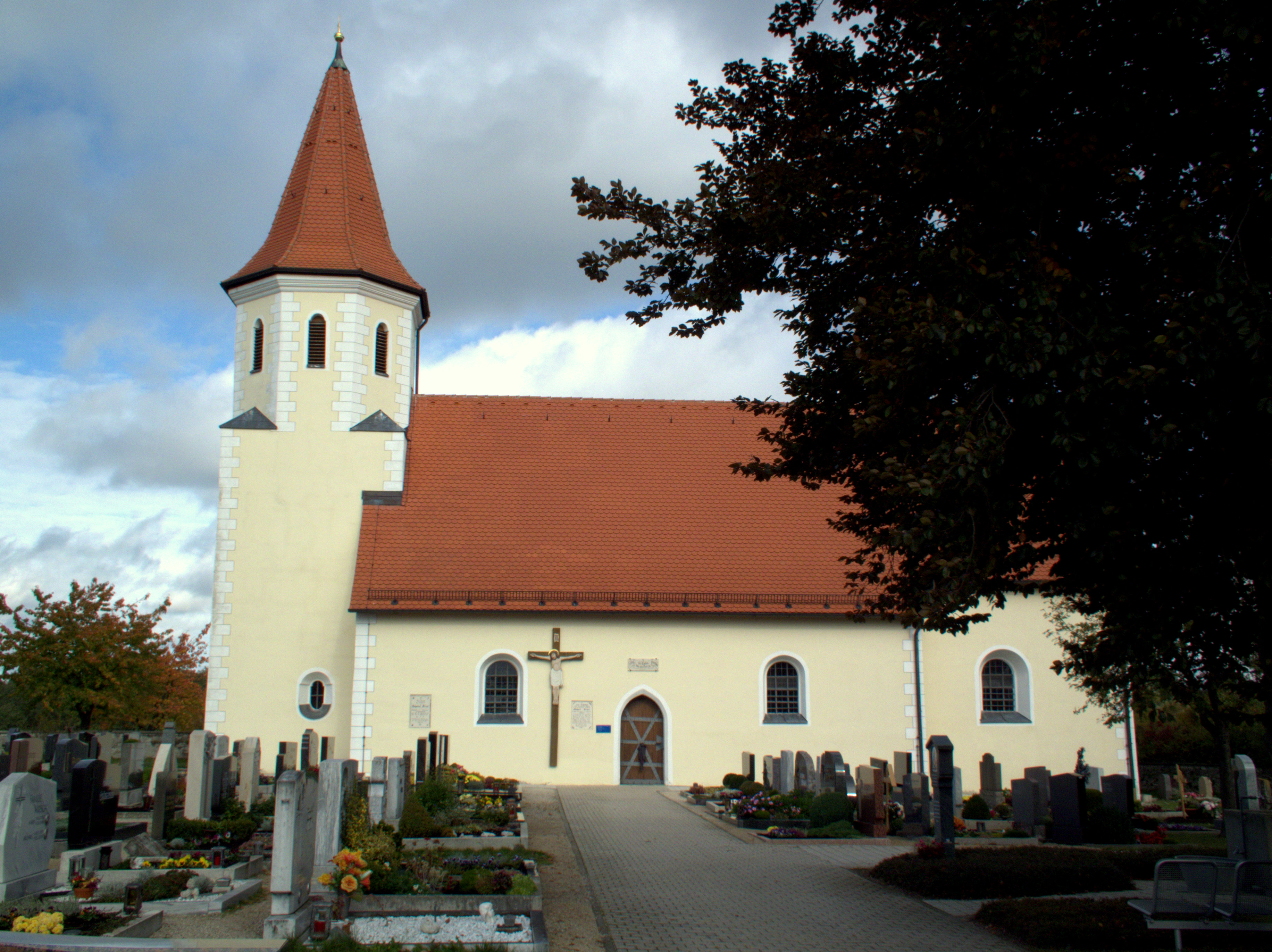 St. Cäcilia - Friedhofskirche von Pavelsbach, ehemals Dorfkirche der Wüstung Kyrstetten/Kirchstetten.